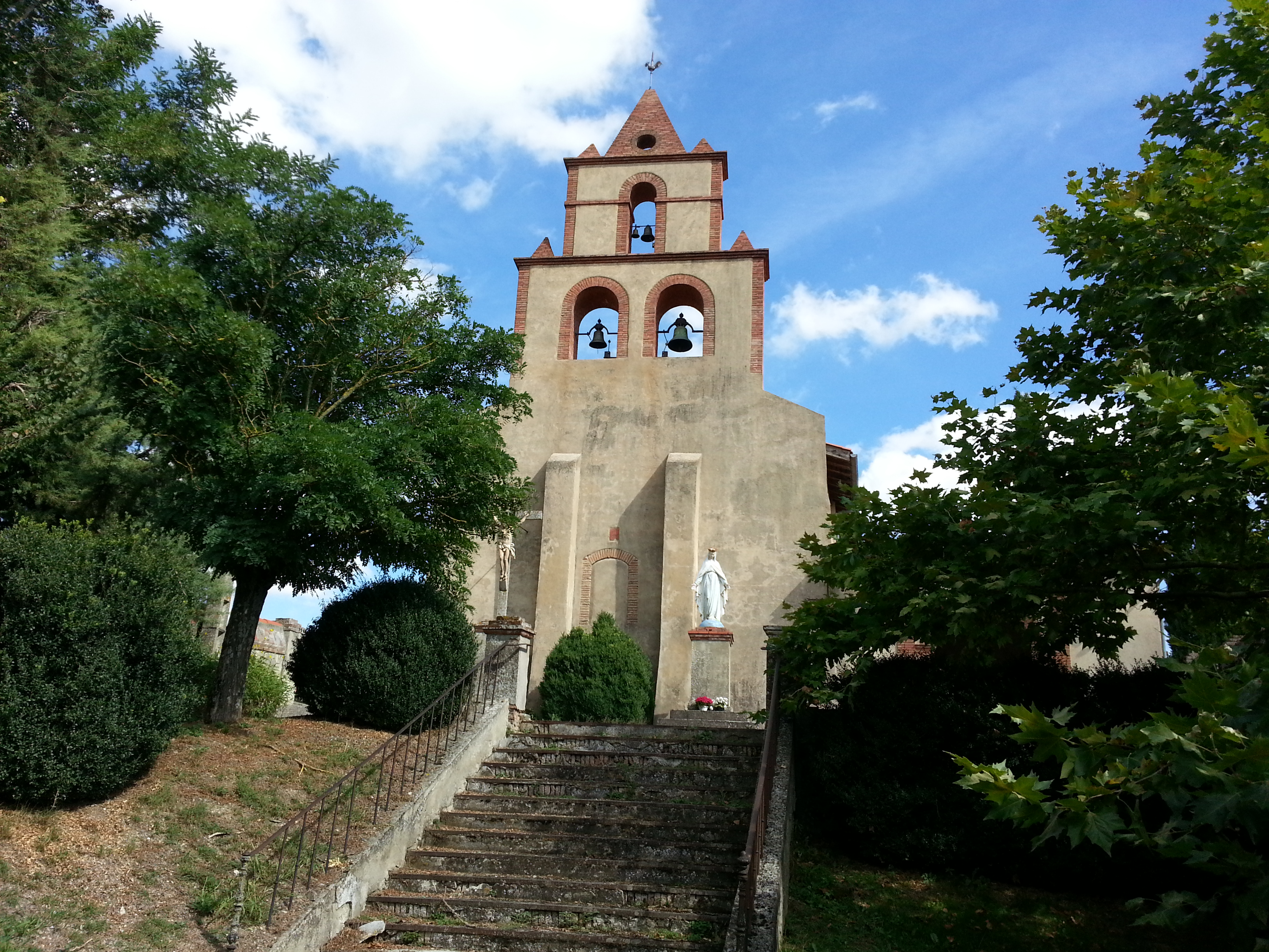 Église Sainte-Apollonie d'Aurin, en Haute-Garonne (France) .